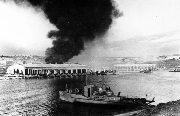 Karantin_bay.jpg: Карантинна бухта Севастополя